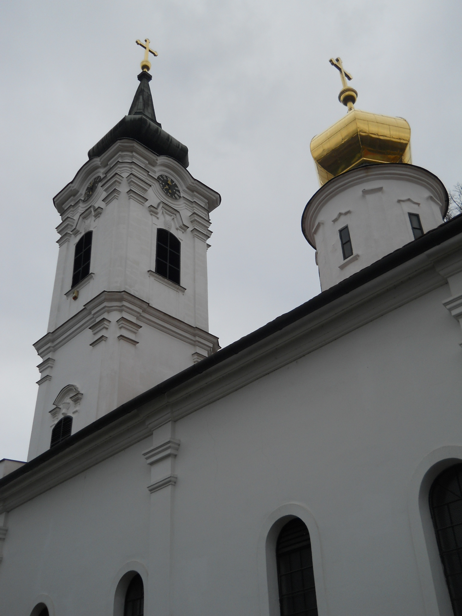 Újvidék - Nikolajevska crkva